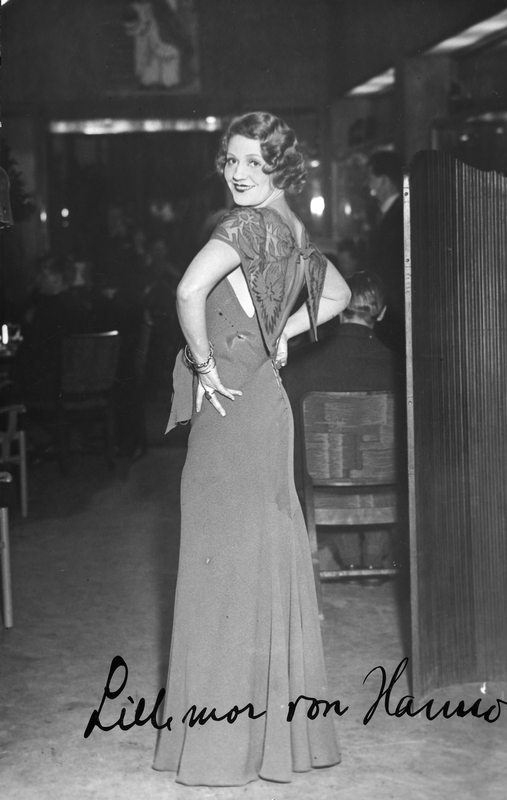 Skuespiller og forfatter Lillemor von Hanno, født Bergljot Gjems Selmer. Fotografert ca. 1930. Autograf.